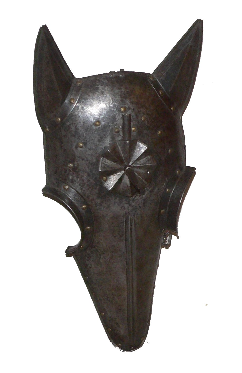 Chanfrain, Savoie, XVIe siècle. Musée du chateau de Morges, Suisse.